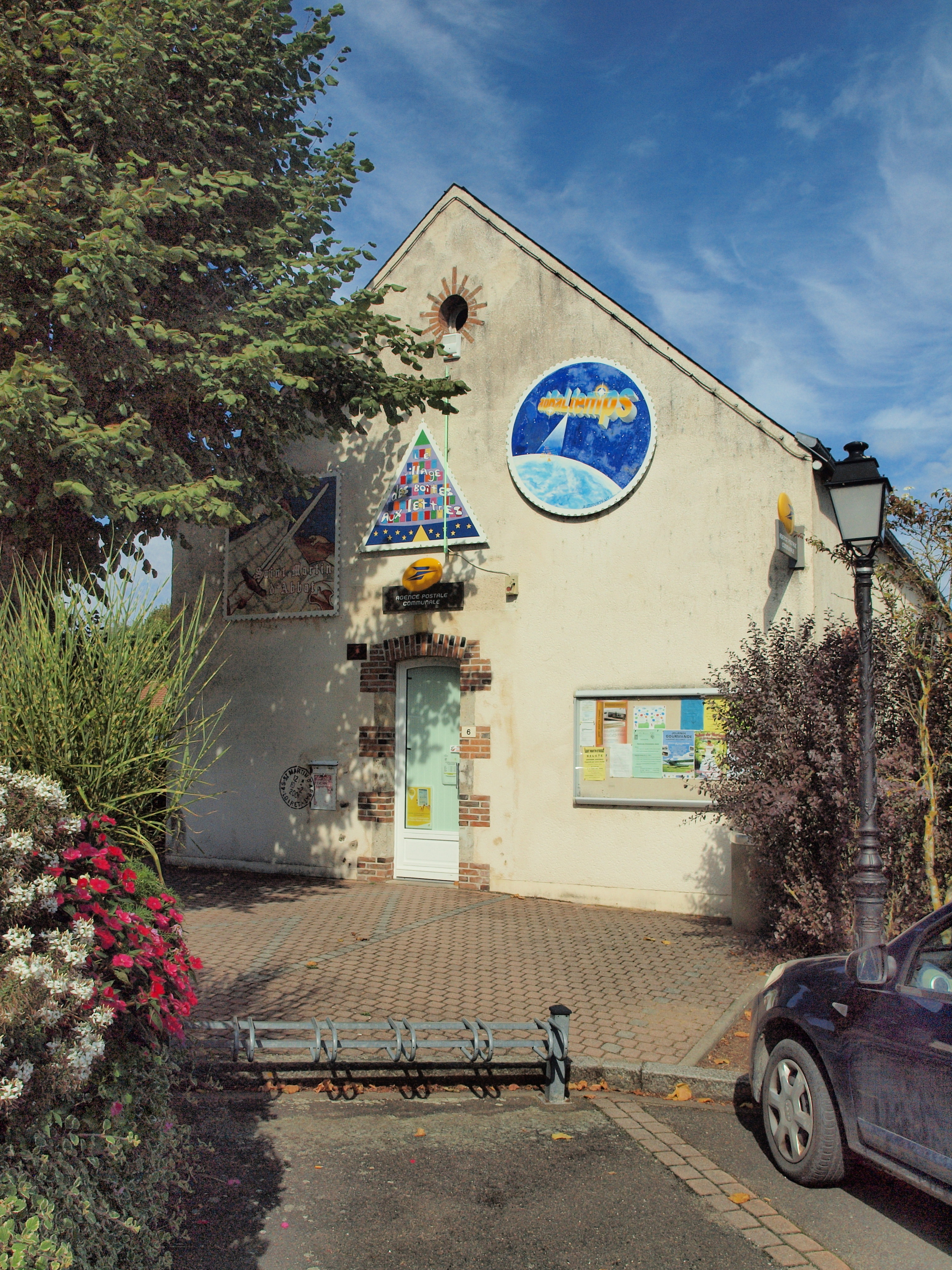 Saint-Martin-d'Abbat (Loiret, France)